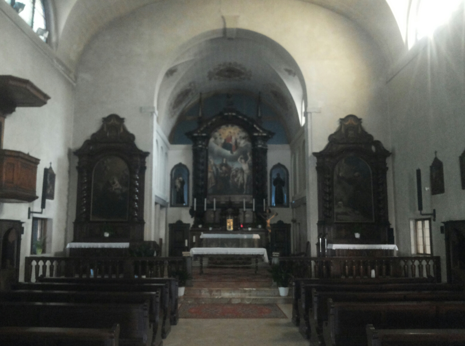 Interno della chiesa di San Rocco a Rovereto (provincia di Trento)